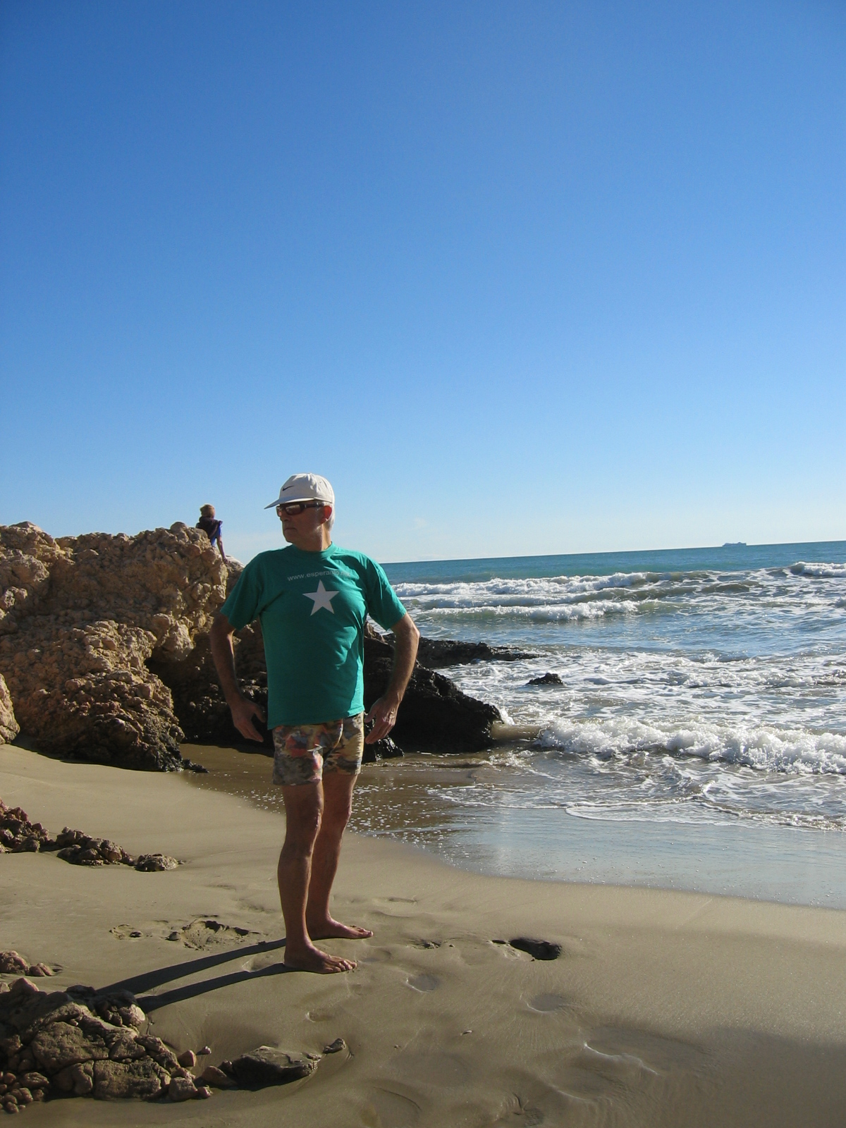 4t moviment de txi kung - Baduanjin foto meva novembre 2006 Joan Inglada Lliure ús)